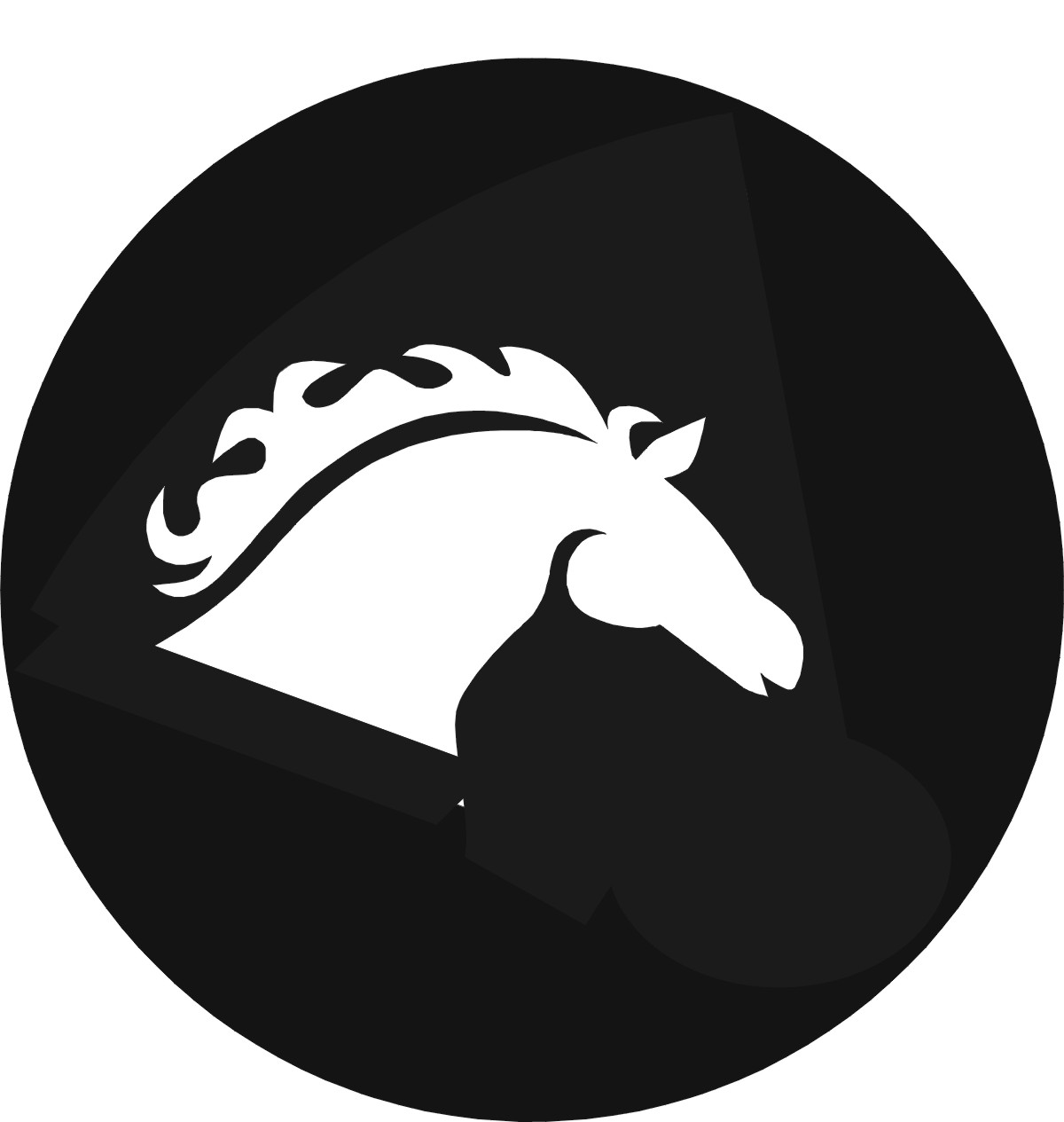 En gobo föreställande ett hästhuvud i profil - egen produktion.